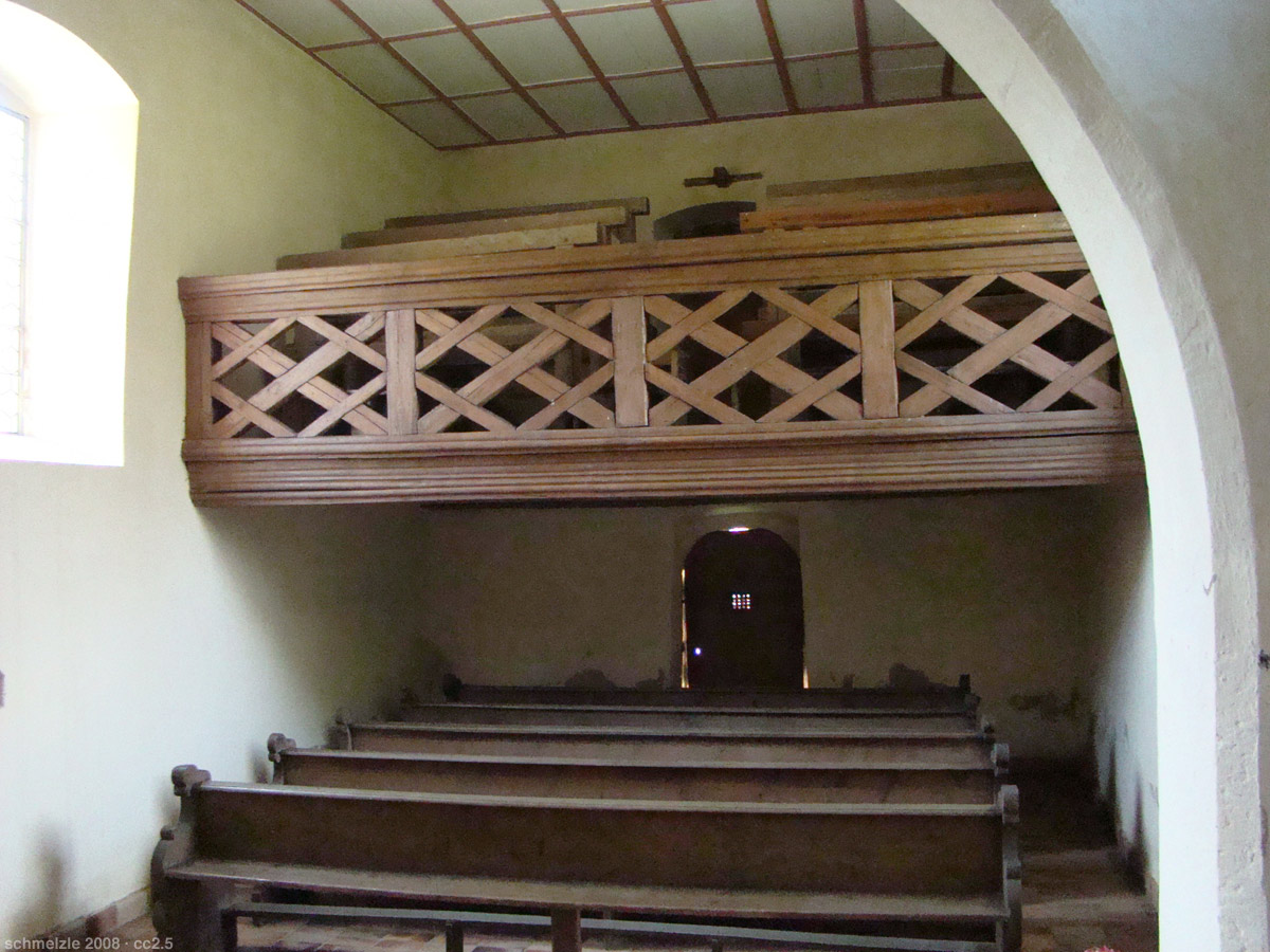 Blick vom Altar zur Empore der St. Anna-Kapelle in Allfeld